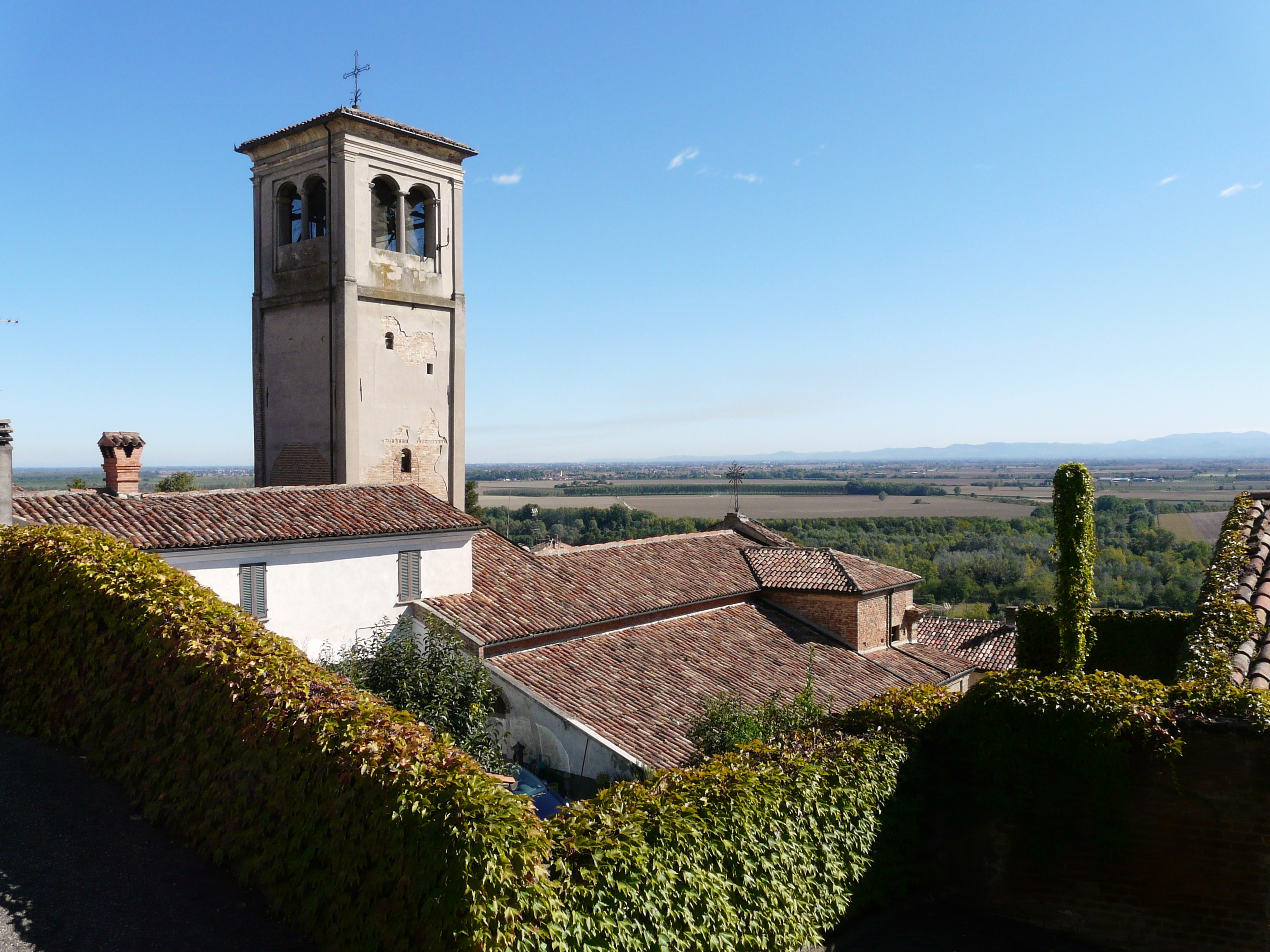 Tetti e campanile della chiesa di Santa Maria di Ponzano di Montecastello, Piemonte, Italy